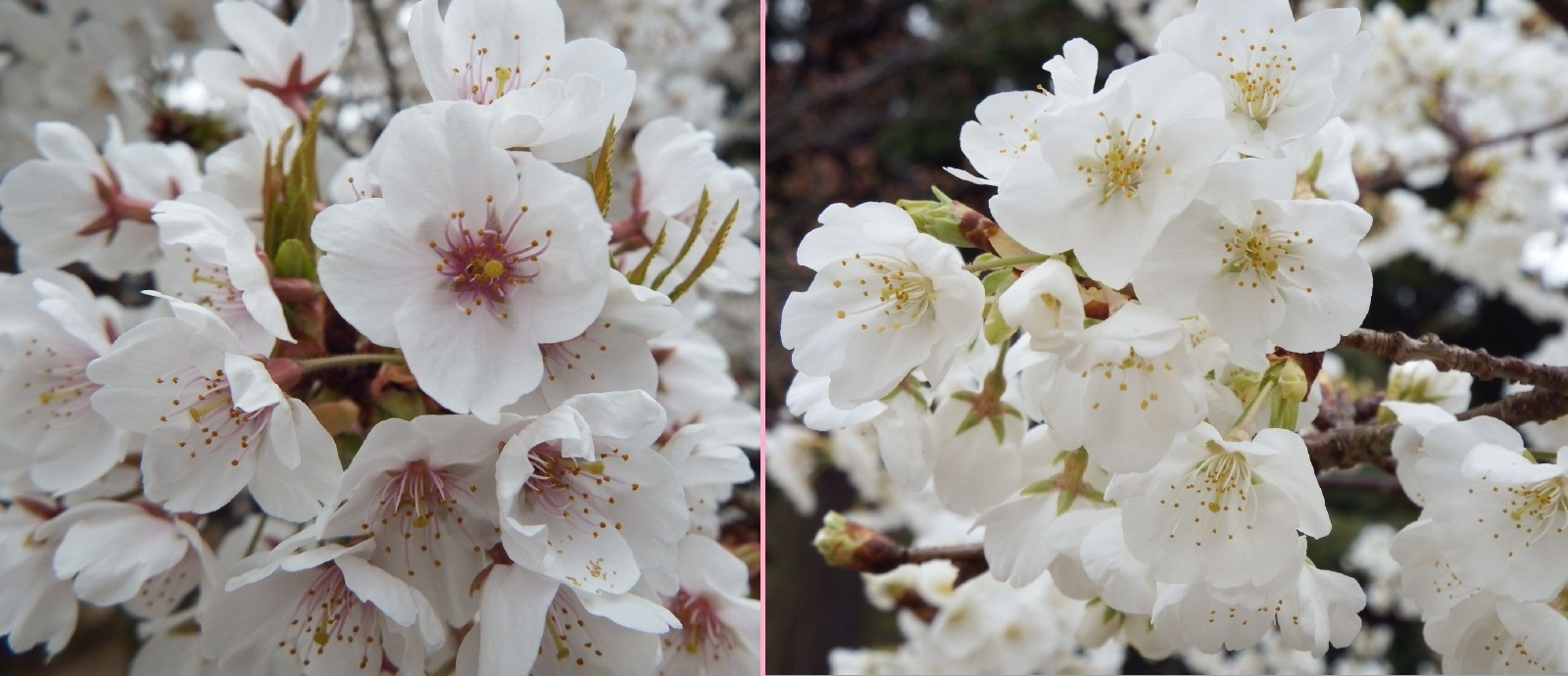 満願寺のマンガンジ桜